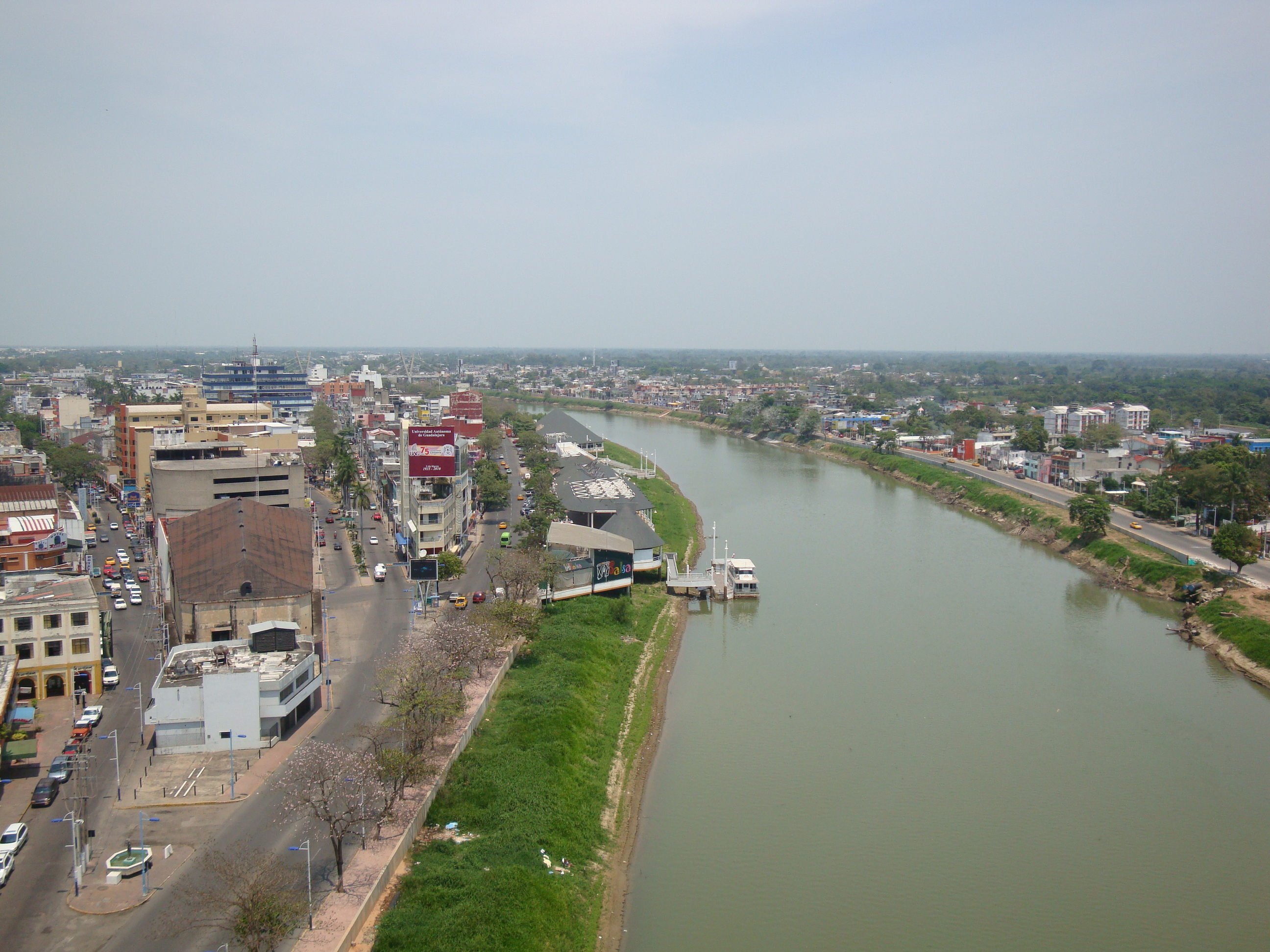 Panorámica del río Grijalva un su paso Por la Ciudad de Villahermosa, Tabasco, México.